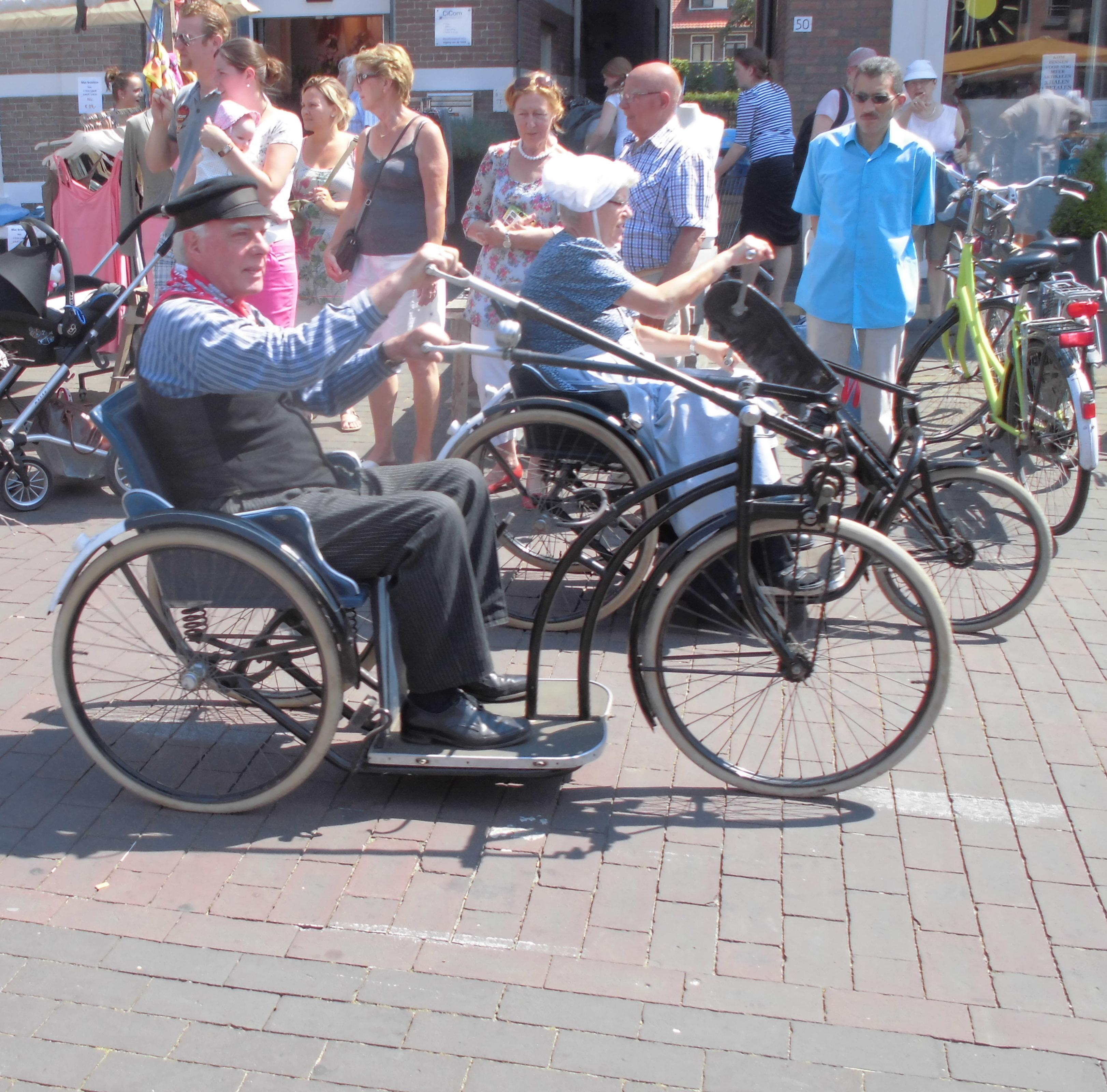 Handfietsen tijdens Oud Veluwse Markt te Barneveld